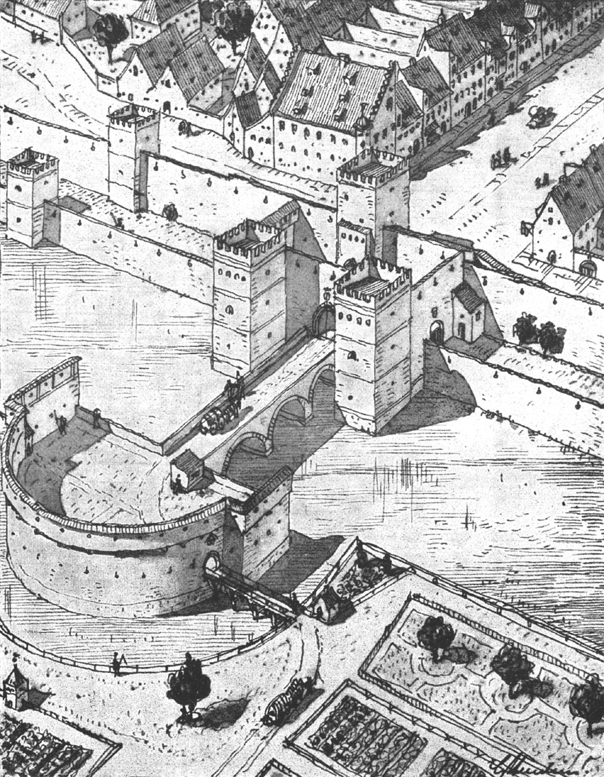 Abb. 22: Das Neuhauser Tor (Karlstor-).